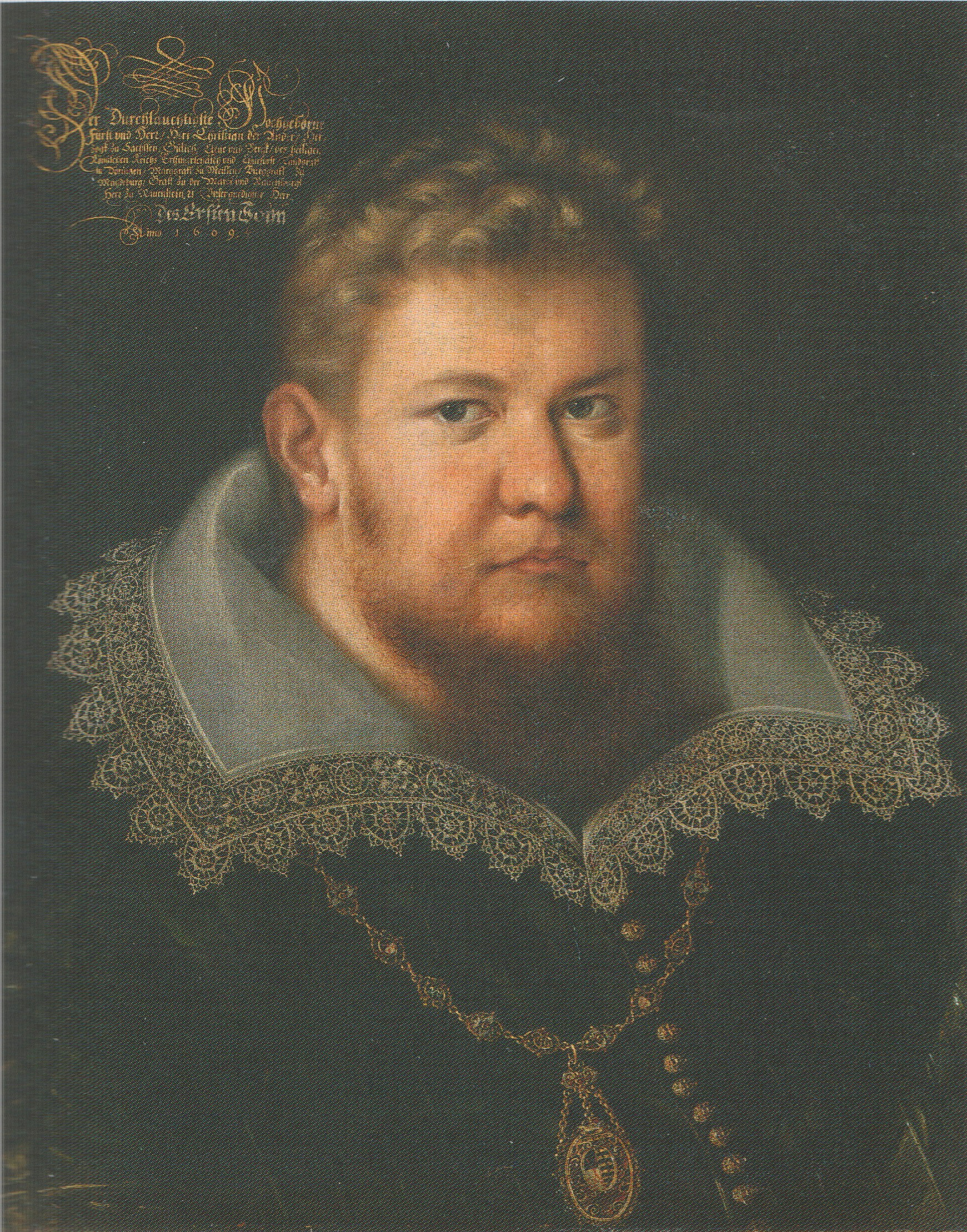 Porträt Kurfürst Christian II. von Sachsen (reg. 1591–1611)